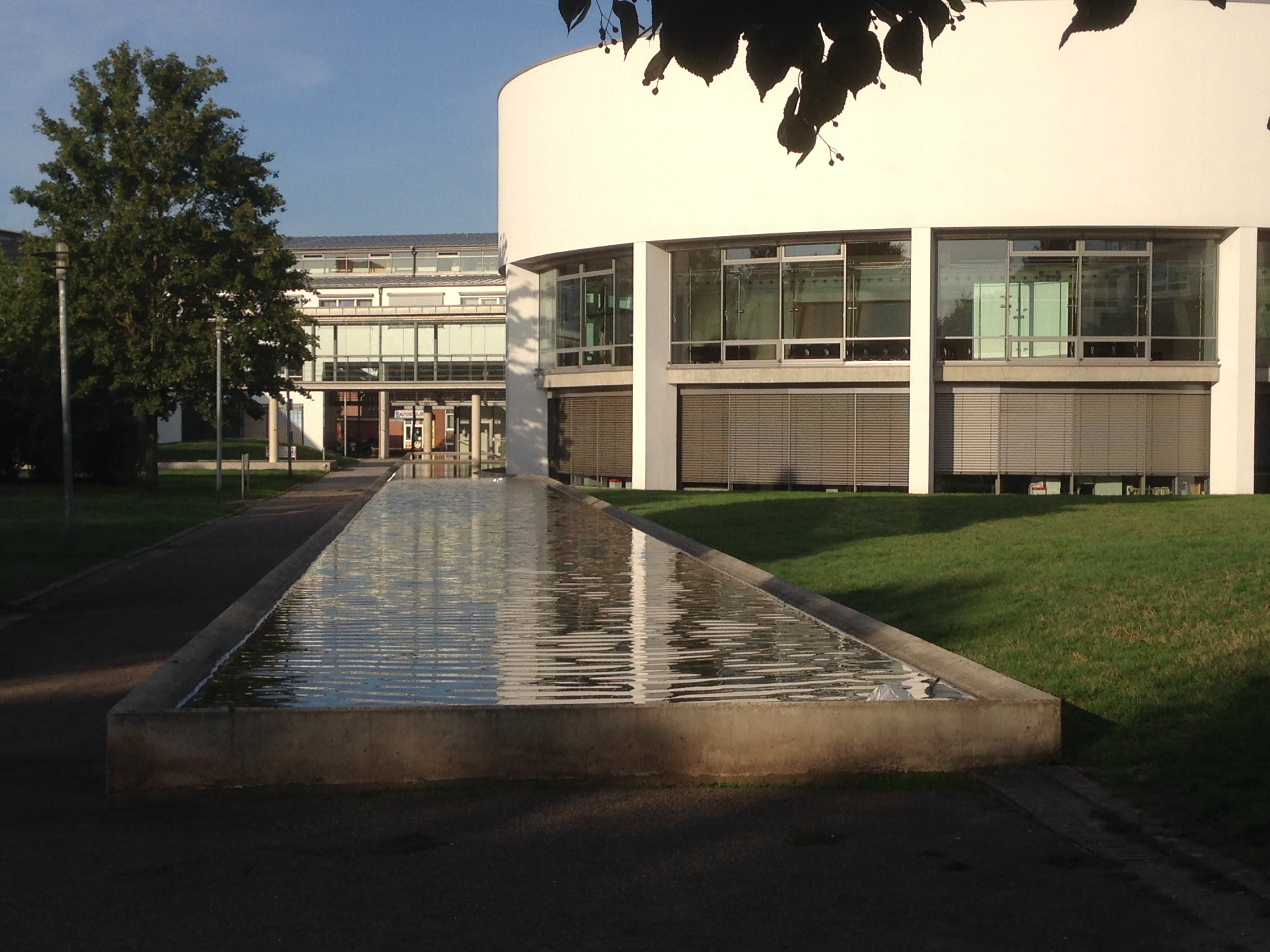 Kreishaus Vechta. Recht in der Rotunde der Große Sitzungssaal.